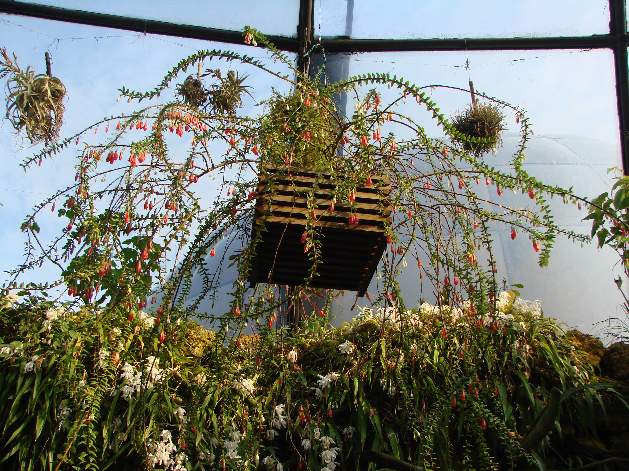 Jardin botanique de l'Université de Zurich (Suisse) : Agapetes serpens Sleumer